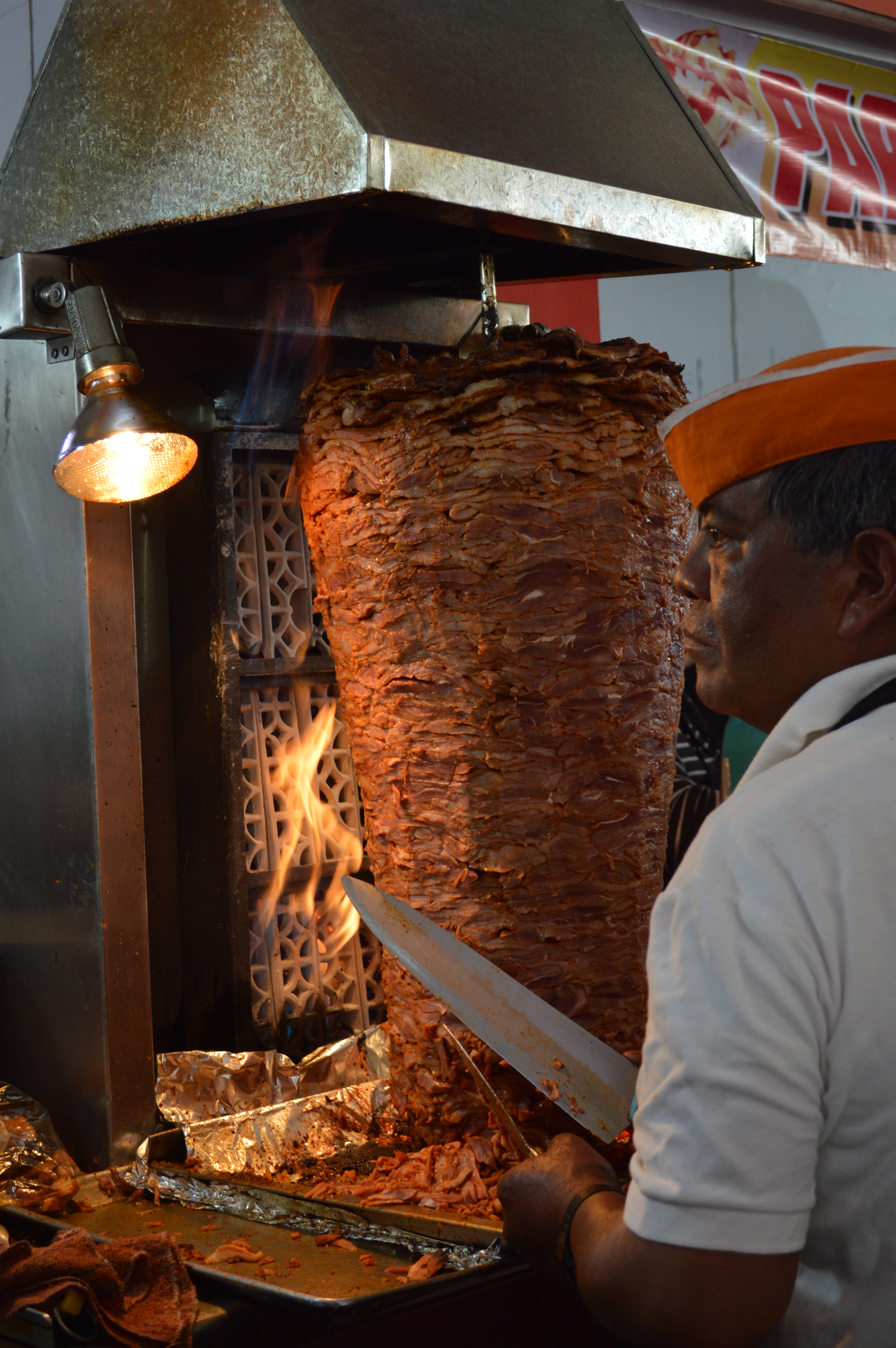 Carving "trompeta" of pastor meat for tortas at the Feria de la Torta at the Venustiano Carranza borough in Mexico City